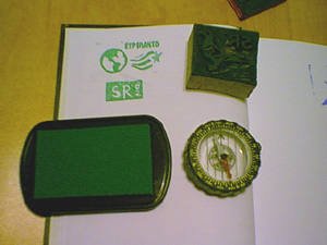 Kaŝkestaĵoj (aĵoj por kaŝkestludado): libro, stampo, stampinkujo, kompaso